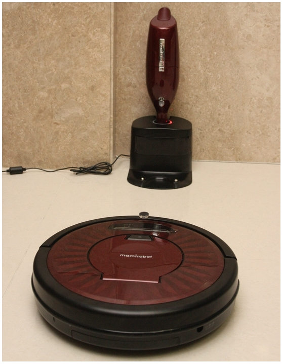 中文（香港）: mamirobot vacuum cleaner